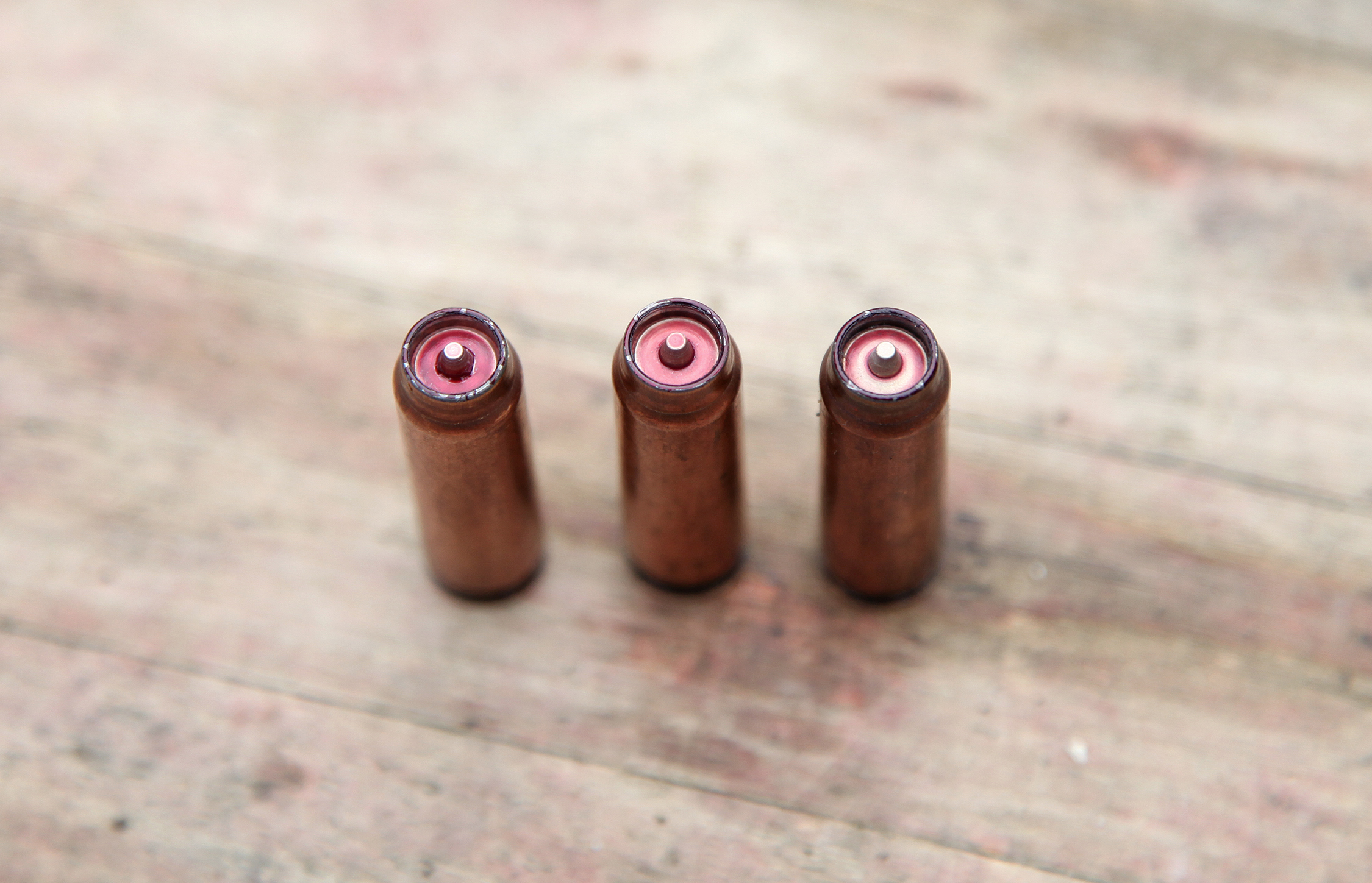 Патроны СП-4 после выстрела (SP-4 rounds after the shooting)